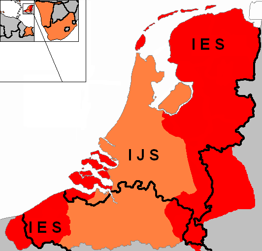 Eigen kaart